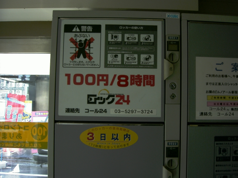 Coin locker, Tokyo, japan